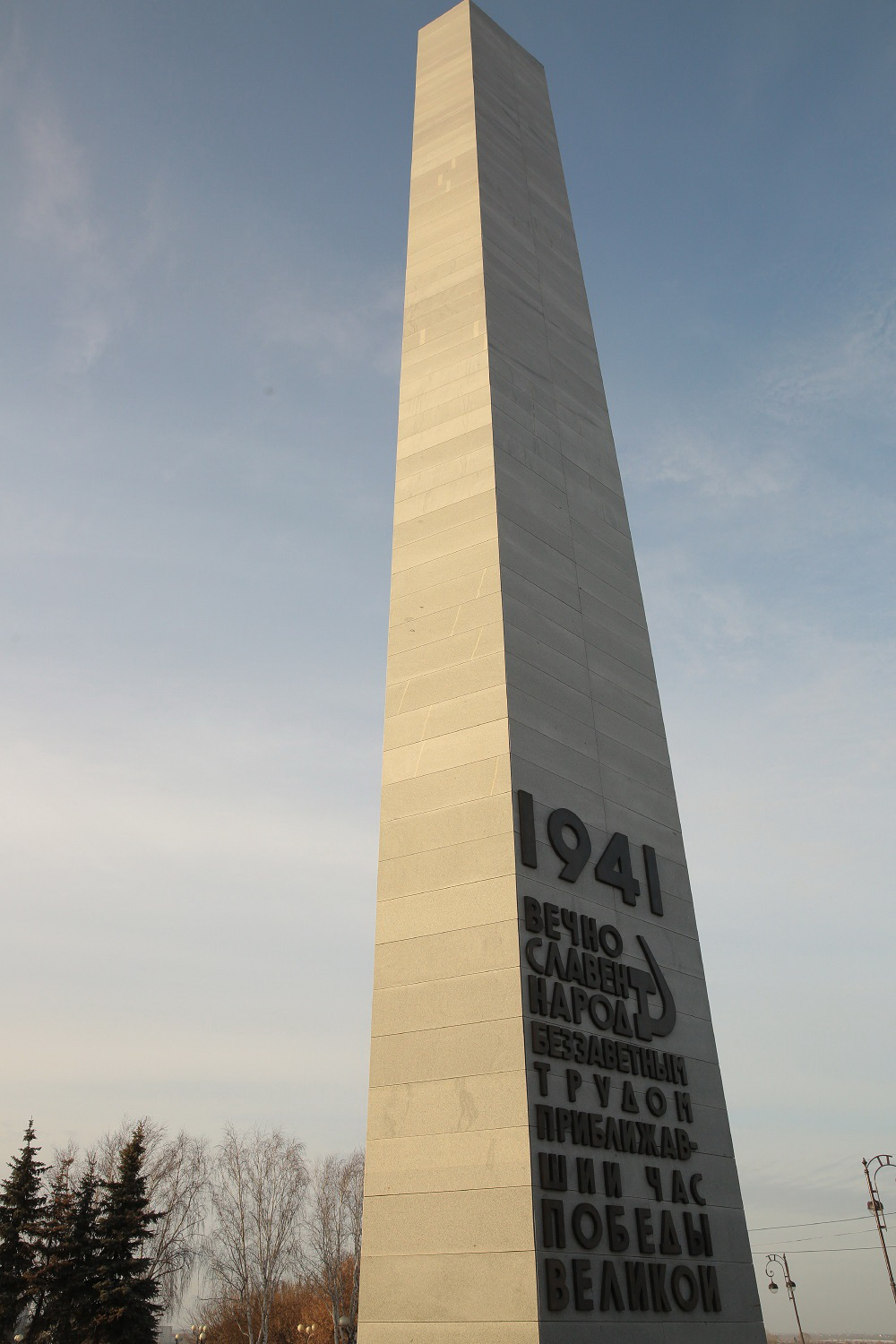 Стела на мемориале